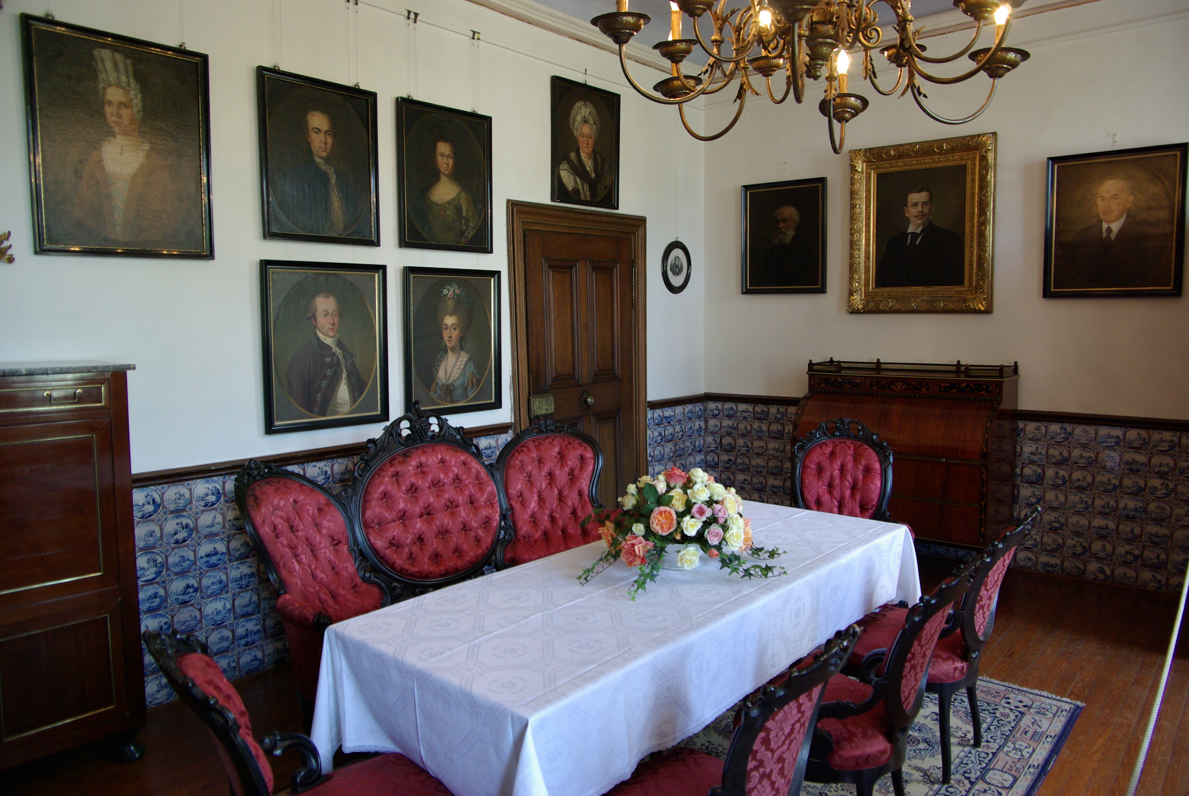 Traben-Trarbach, Mittelmosel-Museum in der Barockvilla Böcking, Speisezimmer im Hochparterre